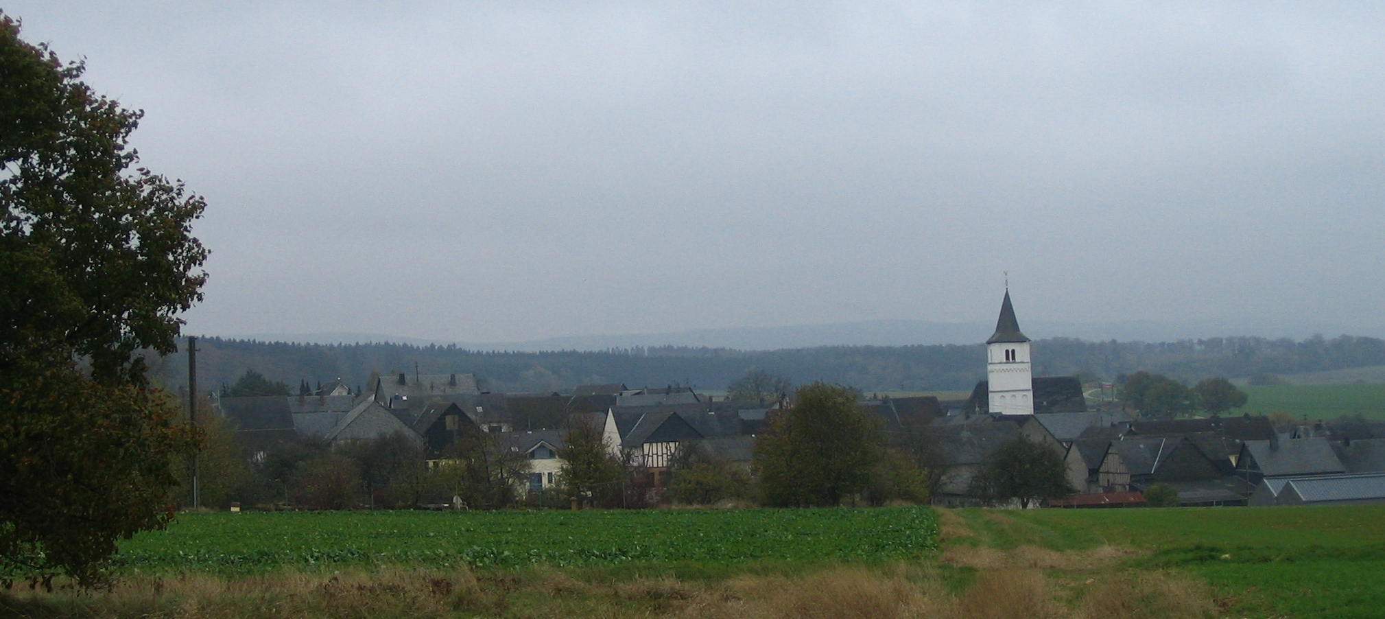 Mörschbach im Hunsrück aus Richtung Norden